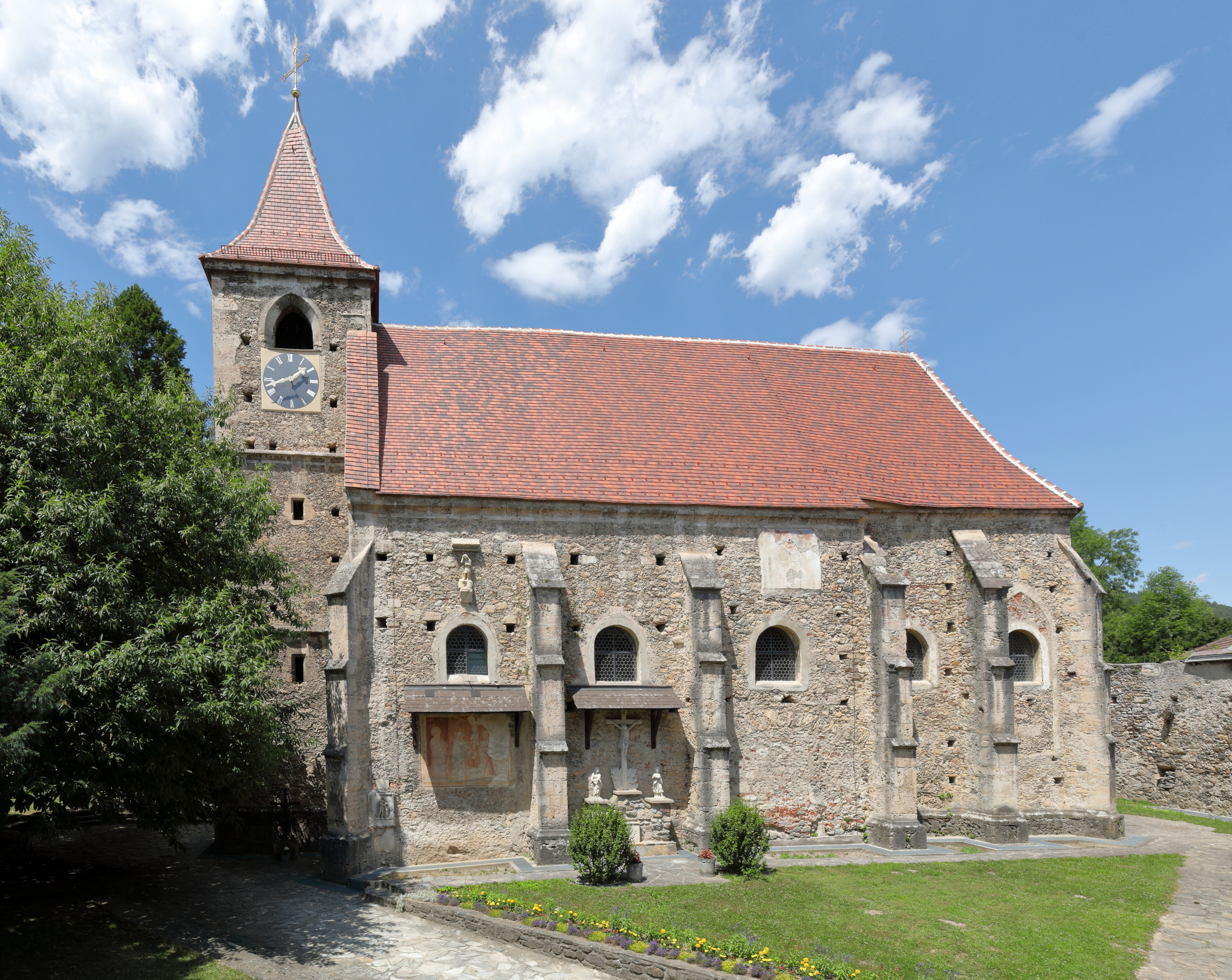 Südansicht der röm.-kath. Pfarrkirche hl. Dionysius in Pottschach, ein Ortsteil der niederösterreichischen Stadtgemeinde Ternitz. Eine spätgotische Wehrkirche mit mittelalterlichem Kern und barocken Anbauten.